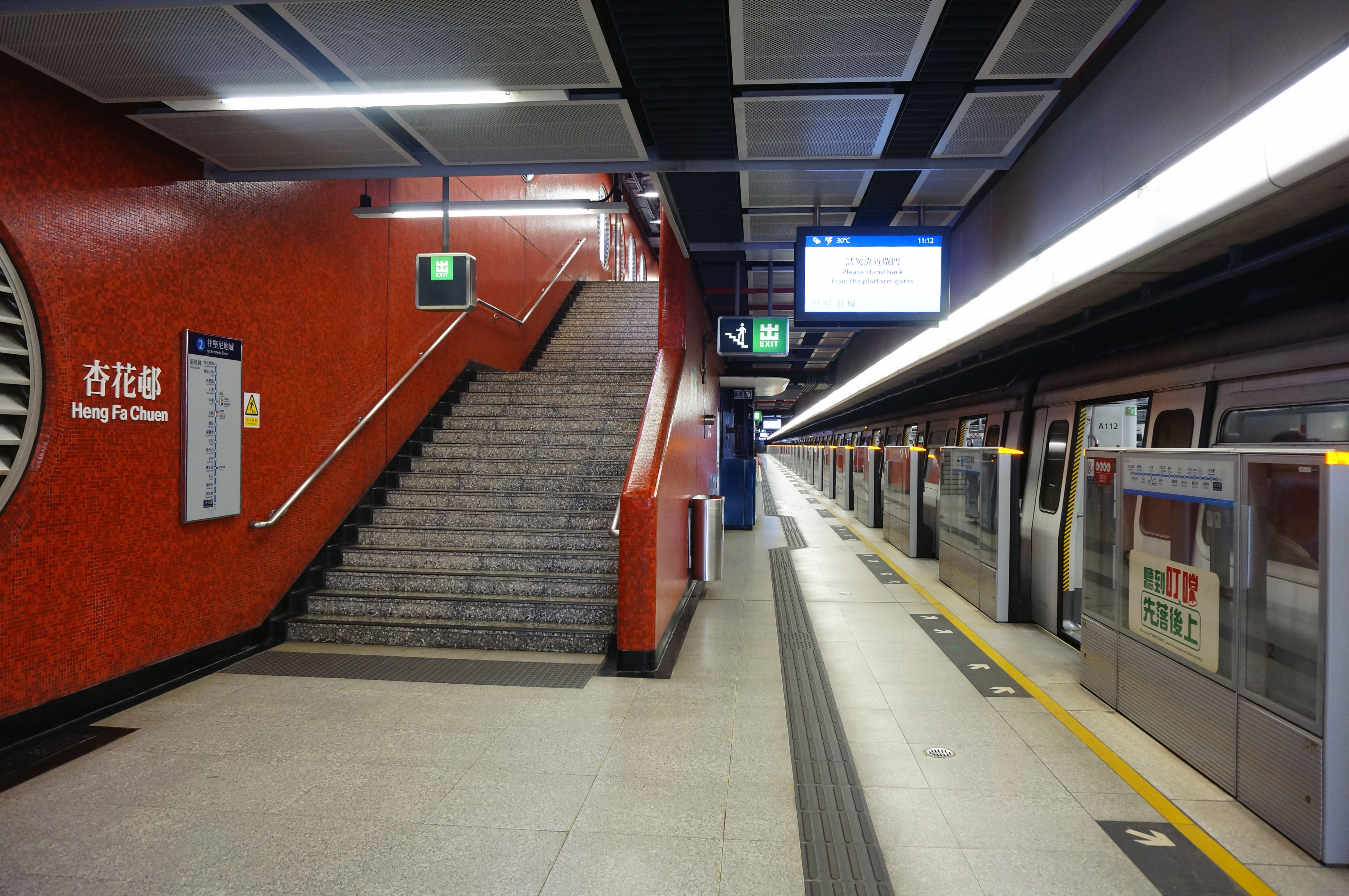 港鐵杏花邨站月台